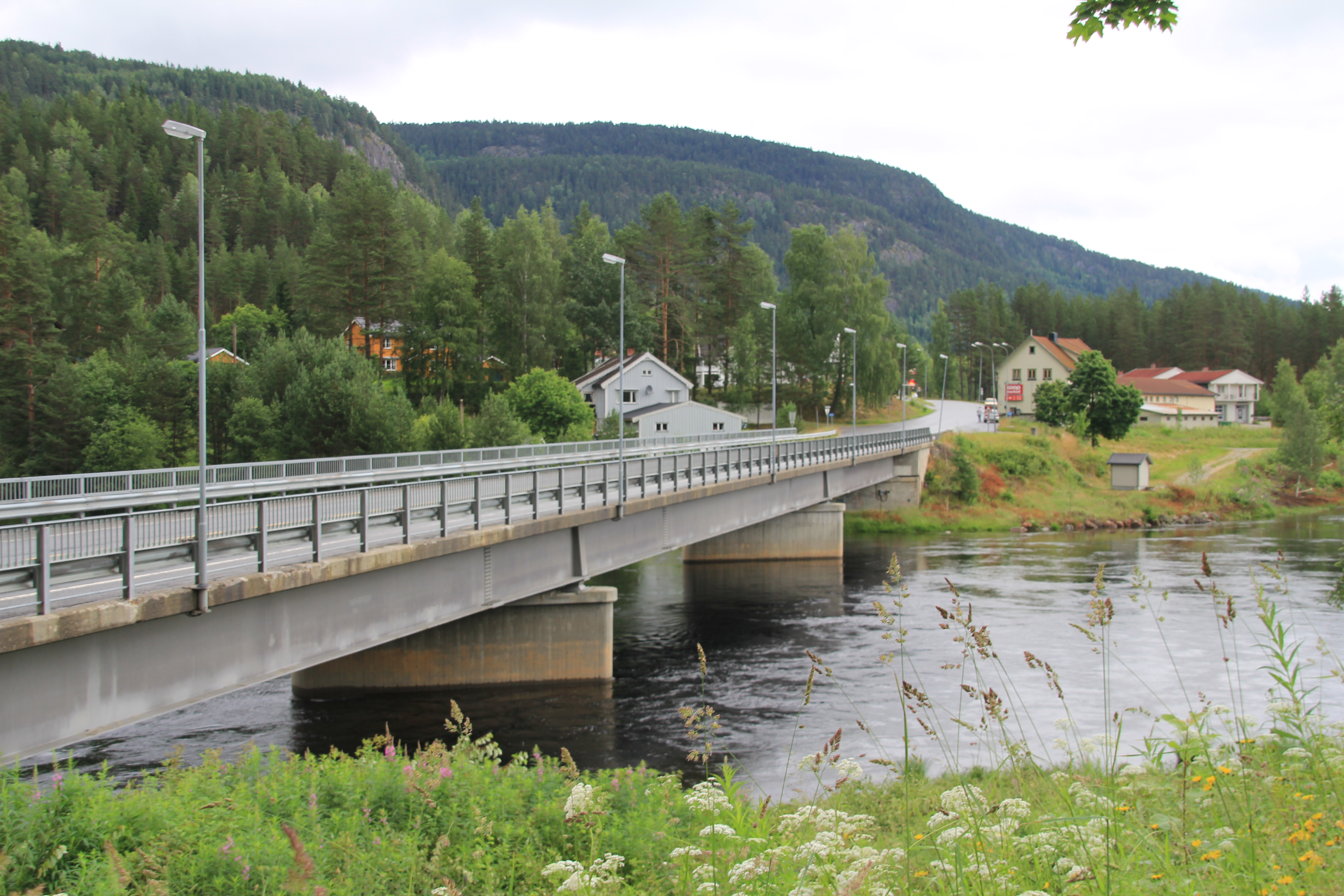 Gransherad er en bygd i Notodden kommune i Telemark, ca. 3 mil fra kommunesenteret Notodden by.